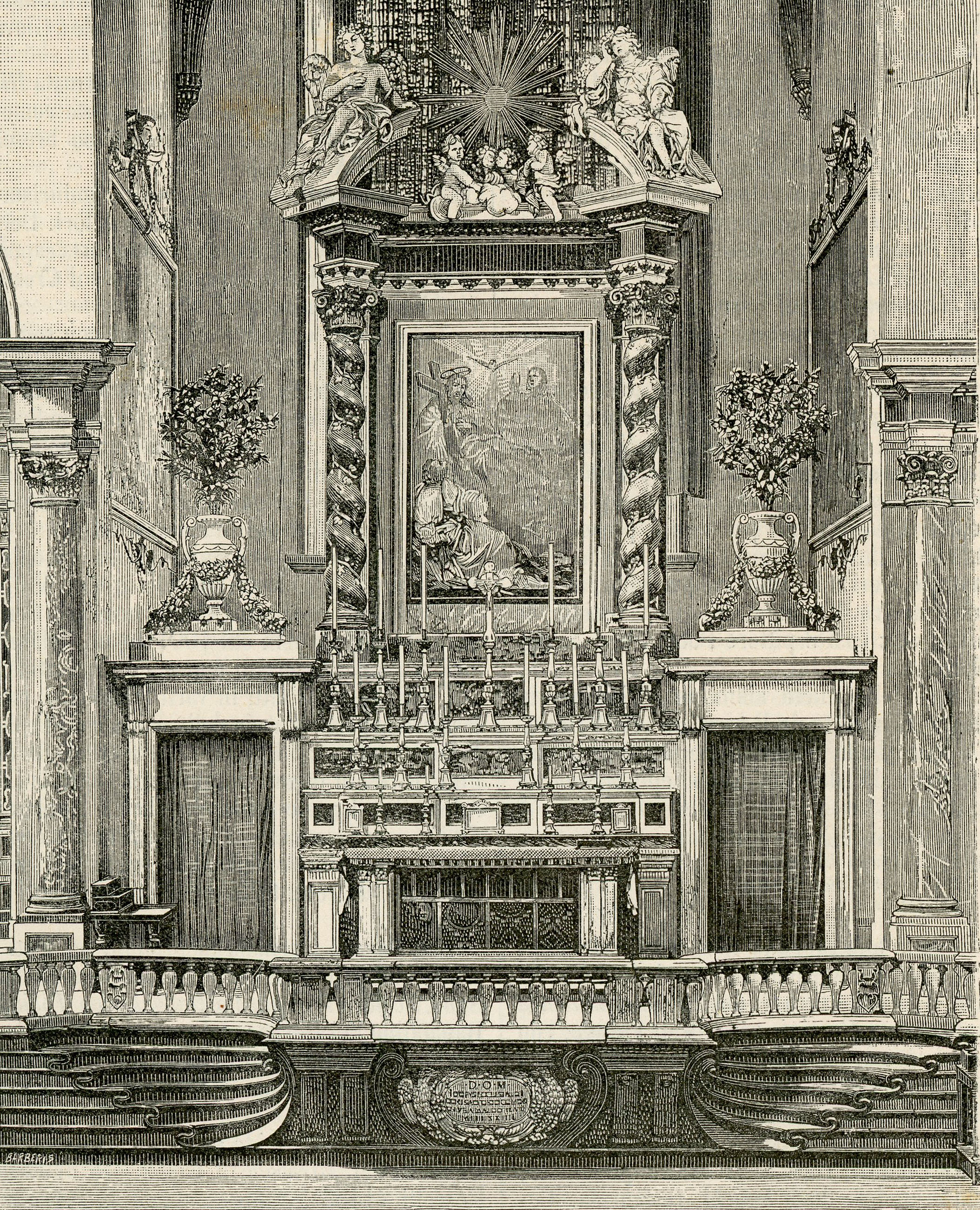 Firenze: Presbiterio ed Altare maggiore della chiesa di Santa Trinita (xilografia di Giuseppe Barberis).